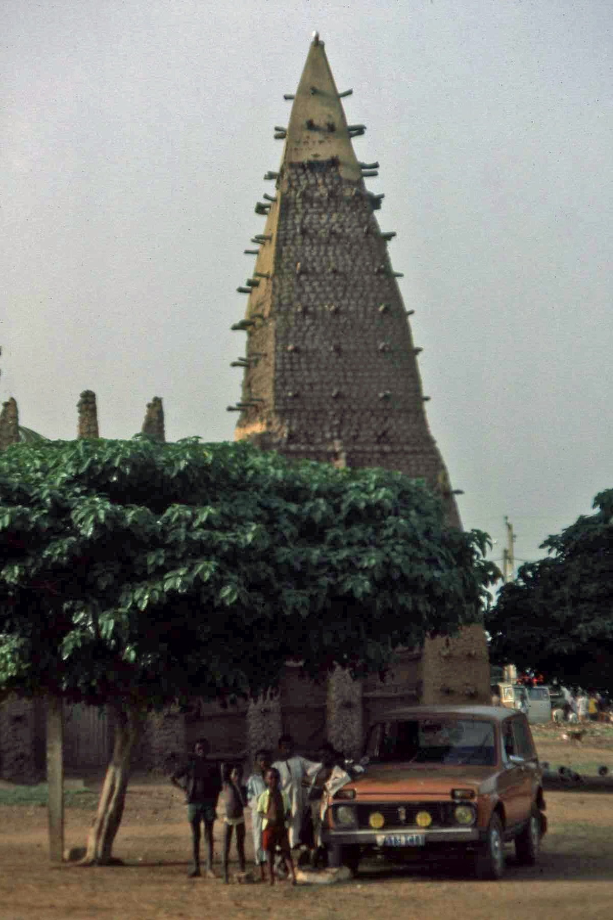 mosquée de Kong